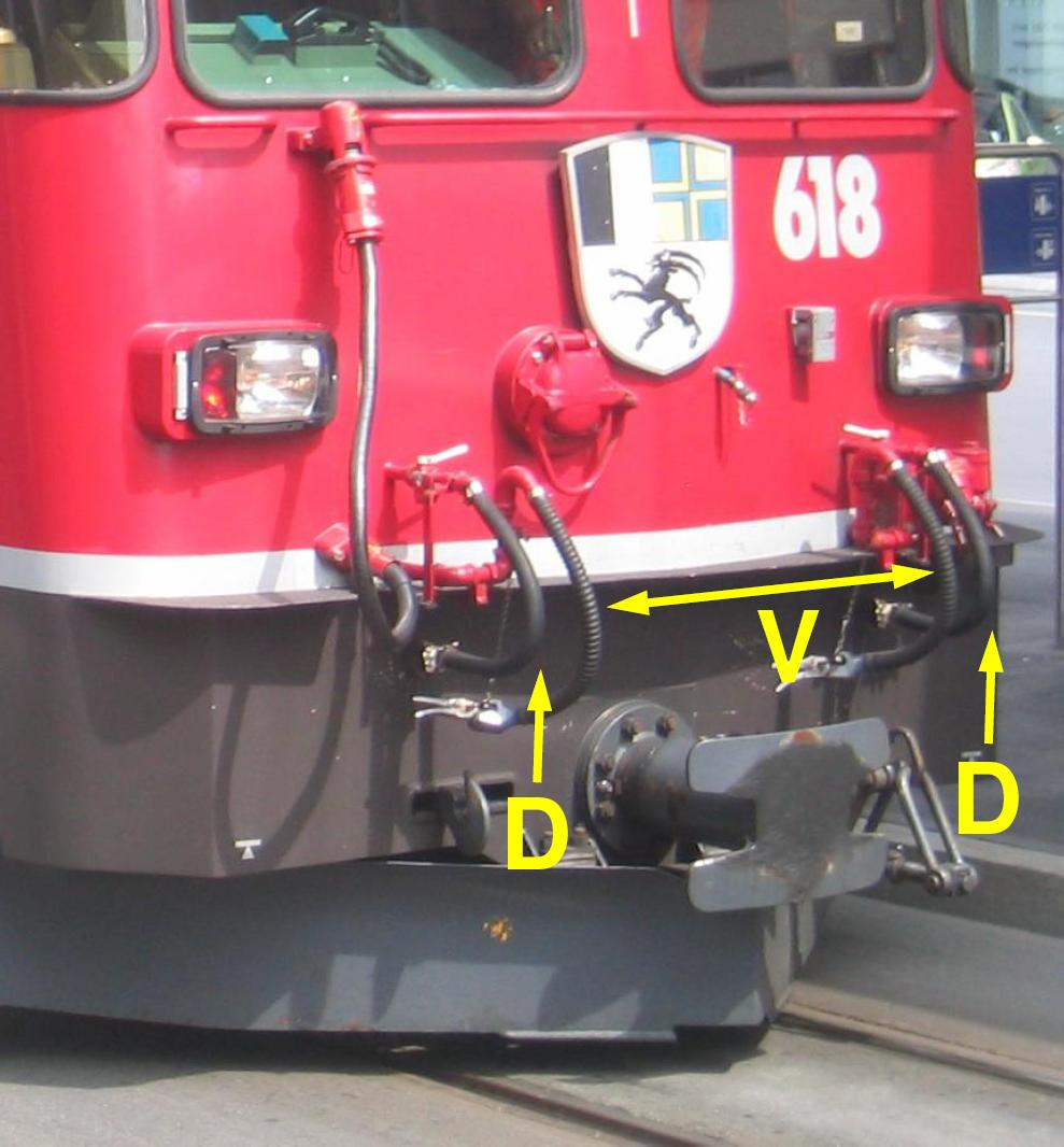 Bremsschläuche der RhB Ge 4/4 II 618 V: Vakuum-Hauptleitung D: Druckluft-Speiseleitung